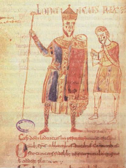 Ludovico il Pio, codice, Bibl. Abbazia SS Trinità, Cava dei Tirreni (Italia)